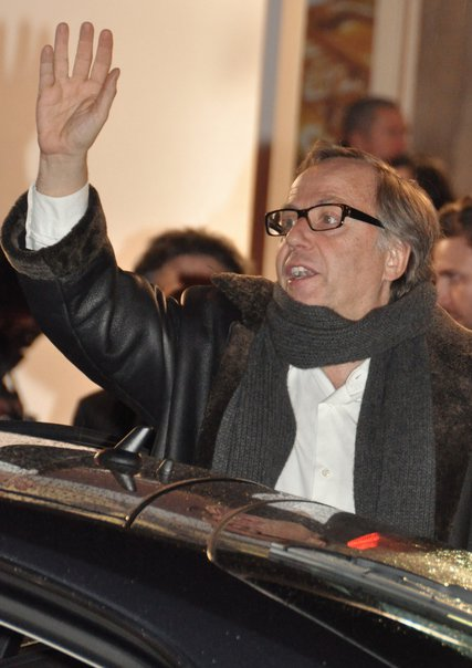 Fabrice Luchini à la cérémonie des Césars 2010.